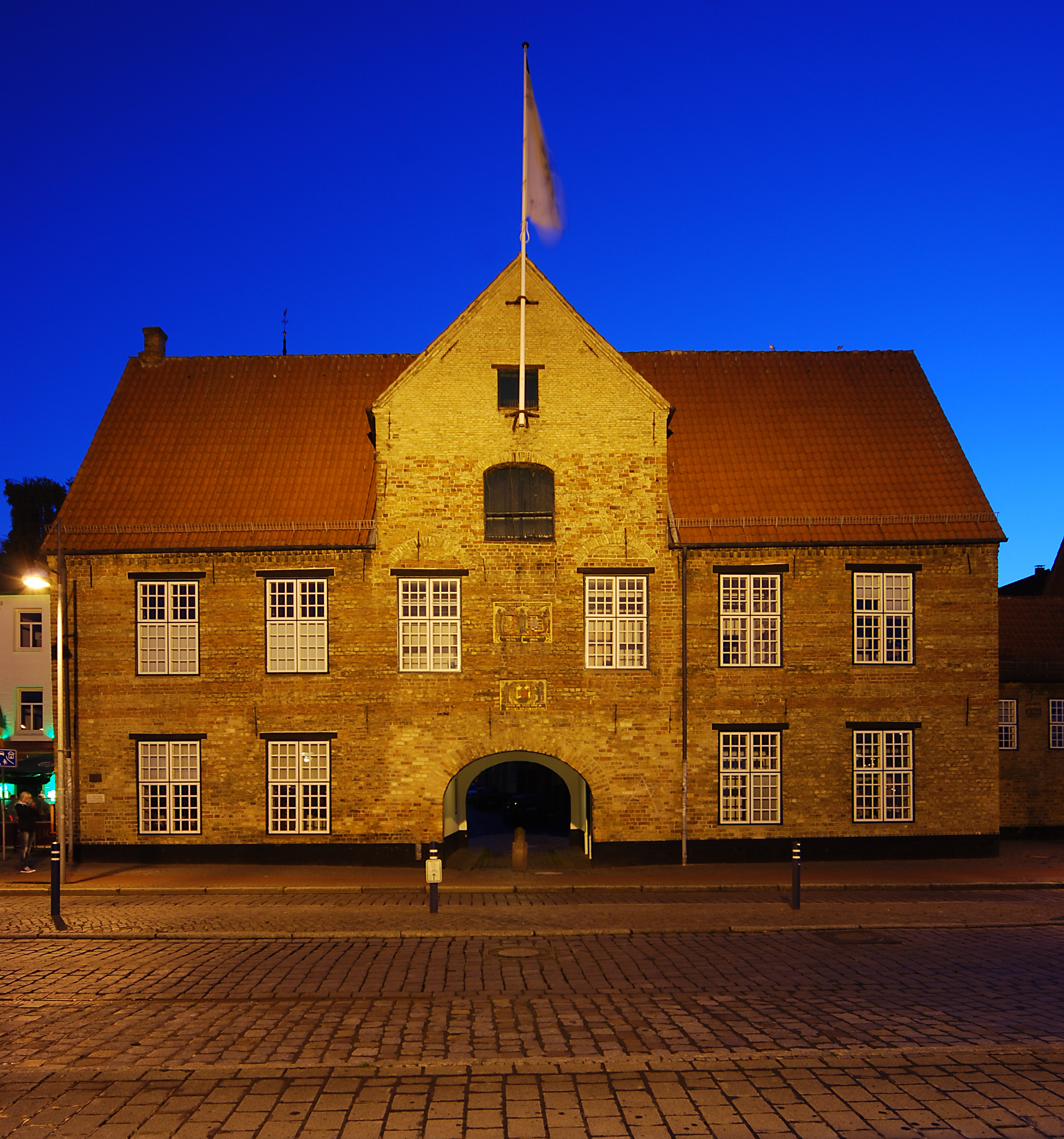 Kompagnietor an der Straße Schiffbrücke im Stadtteil Altstadt der kreisfreien Stadt Flensburg in Schleswig-Holstein